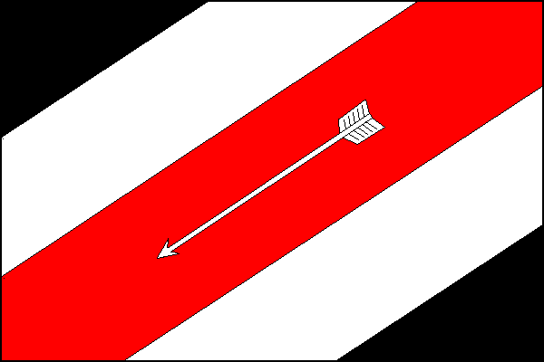 vlajka, Postřelmov, okres Šumperk